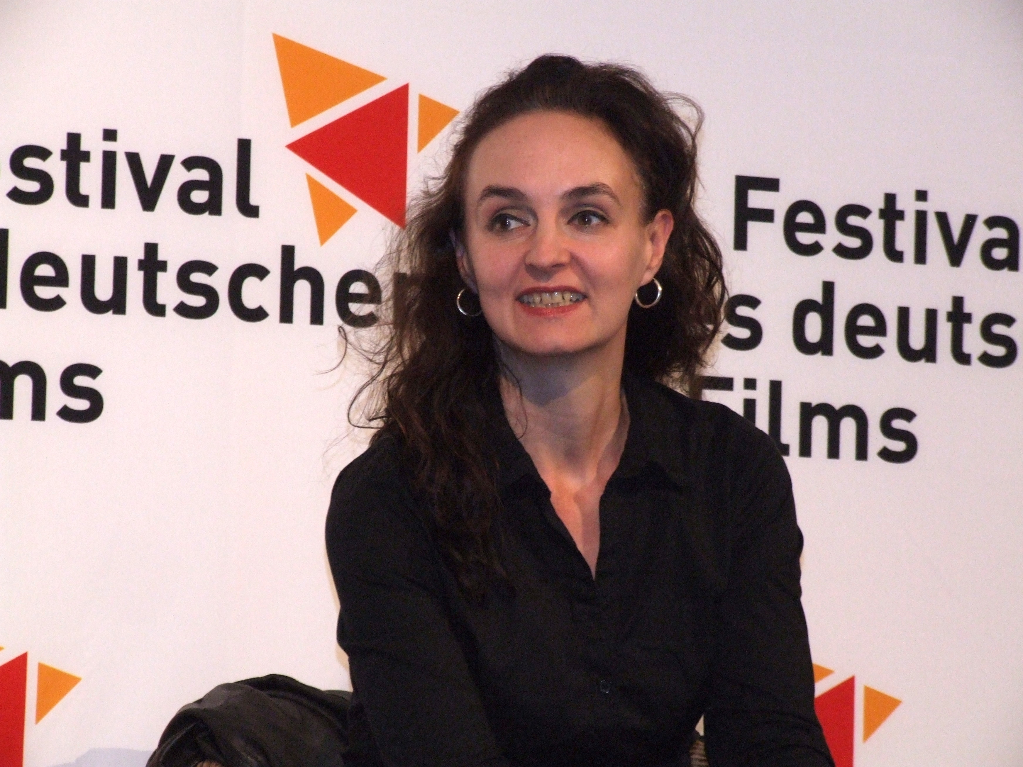 Nicole Weegmann beim Filmgespräch zum Film "Schenk mir dein Herz" auf dem Festival des deutschen Films, 2011, Parkinsel Ludwigshafen